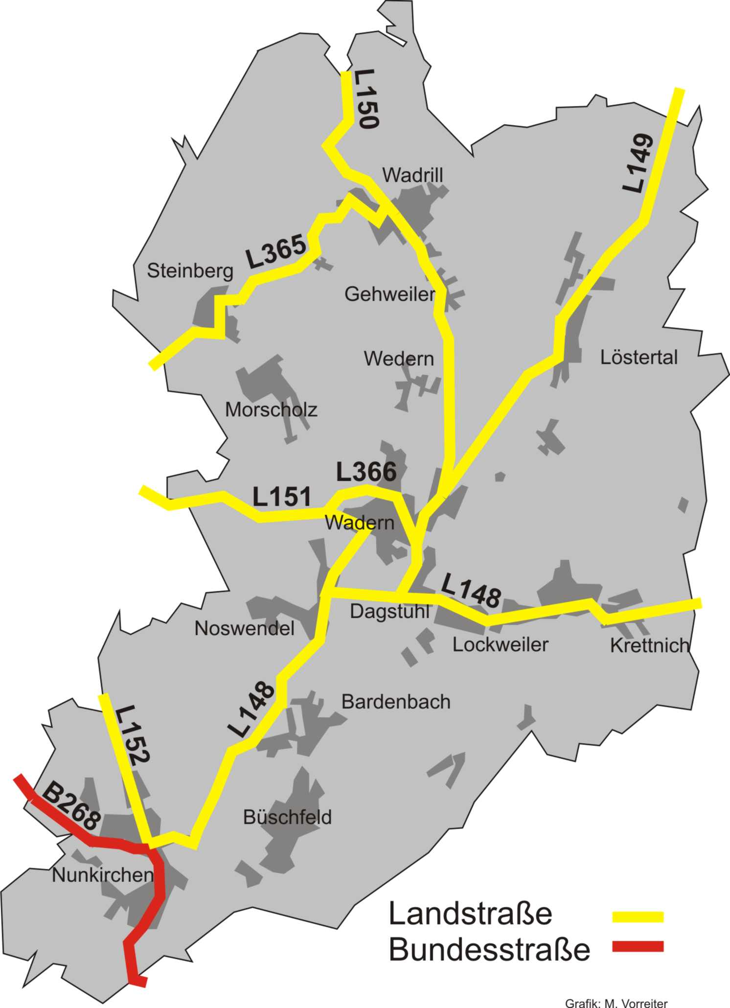 Straßensystem in der Stadt Wadern